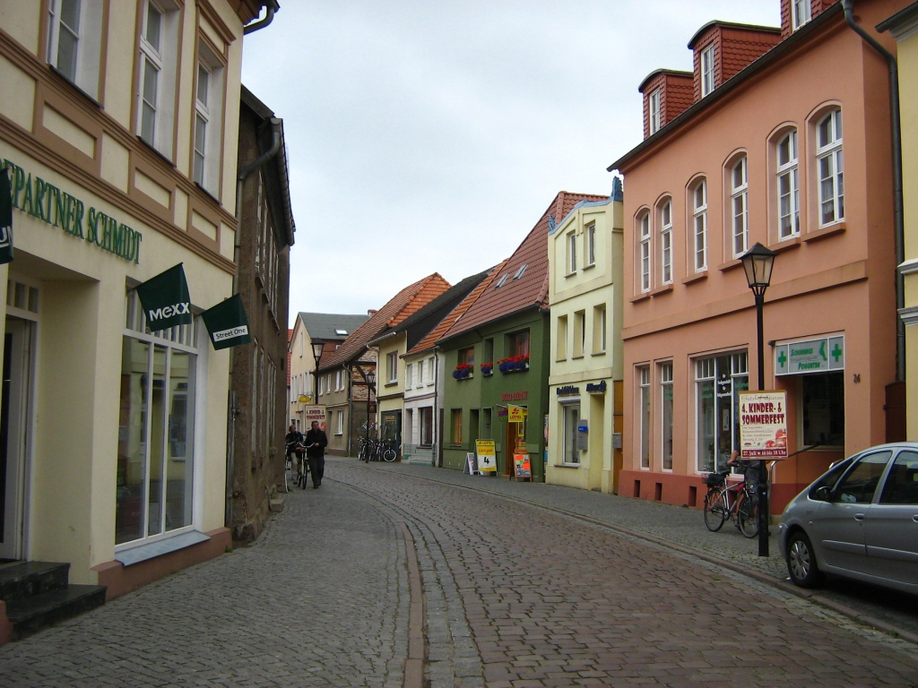 Straße der Malchower Altstadt auf der Insel (Landkreis Müritz, Mecklenburg-Vorpommern).